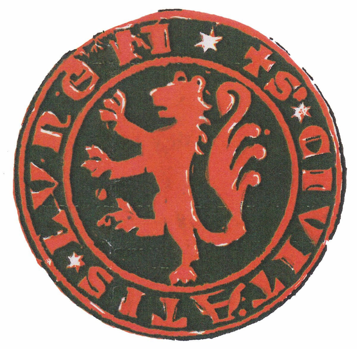 Siegel der Stadt Lünen von 1320